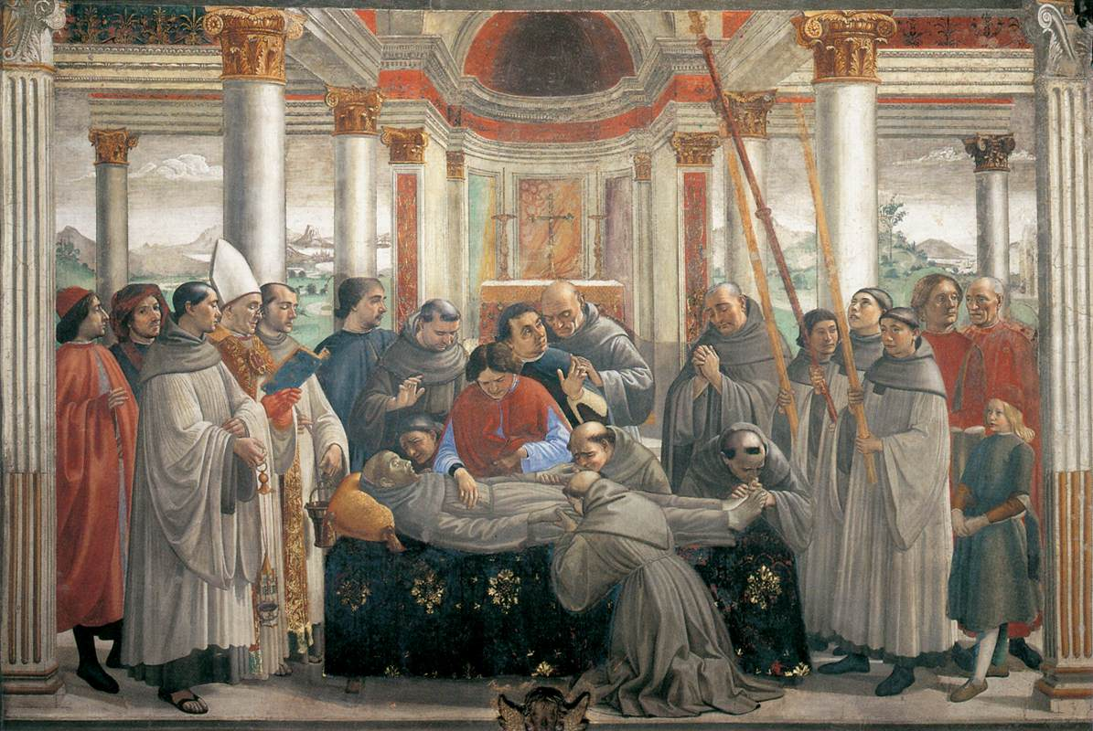 Death of St. Francis (Cappella Sassetti, Santa Trinità, Florence)